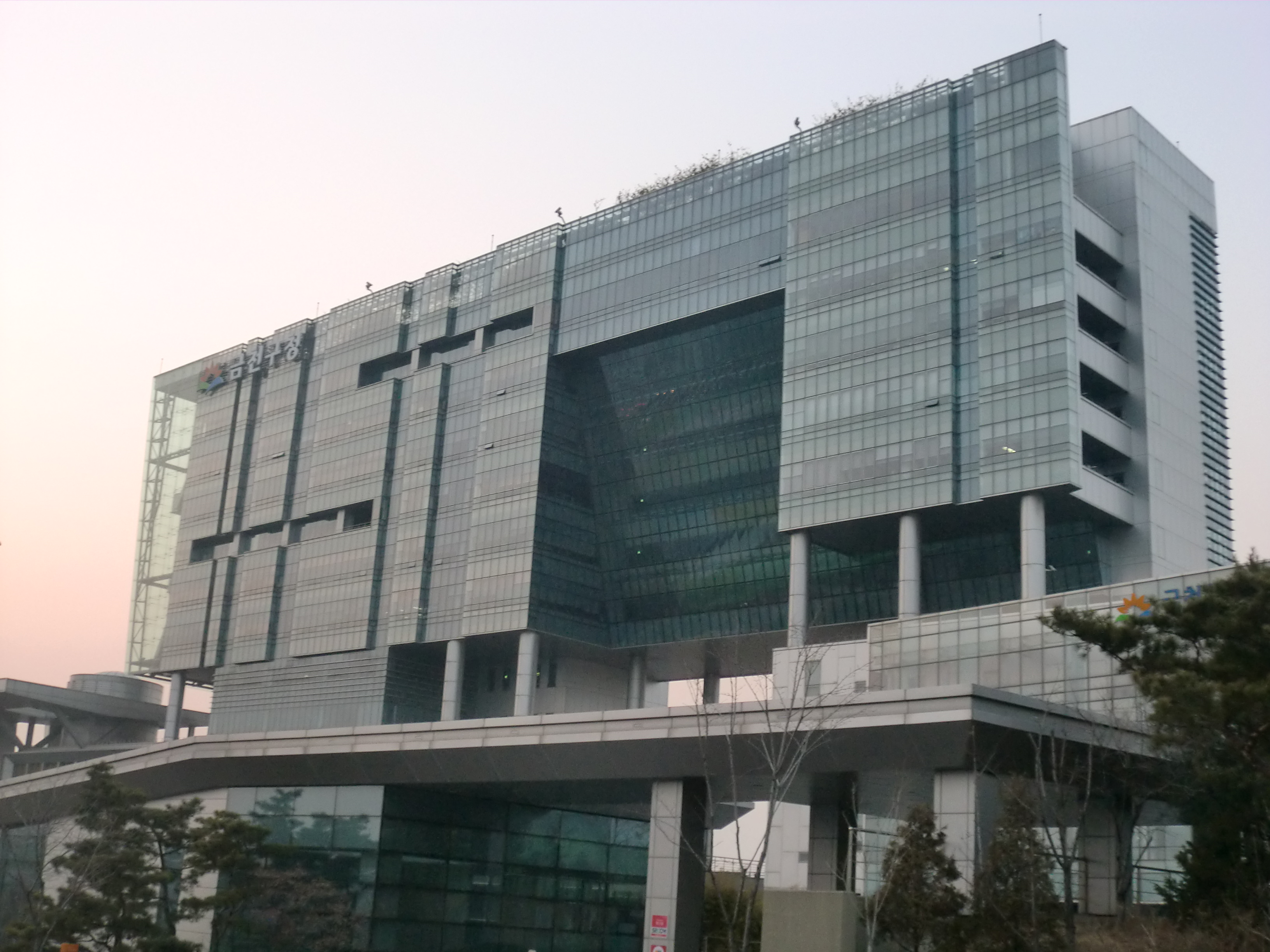 서울특별시 금천구에 있는 금천구청